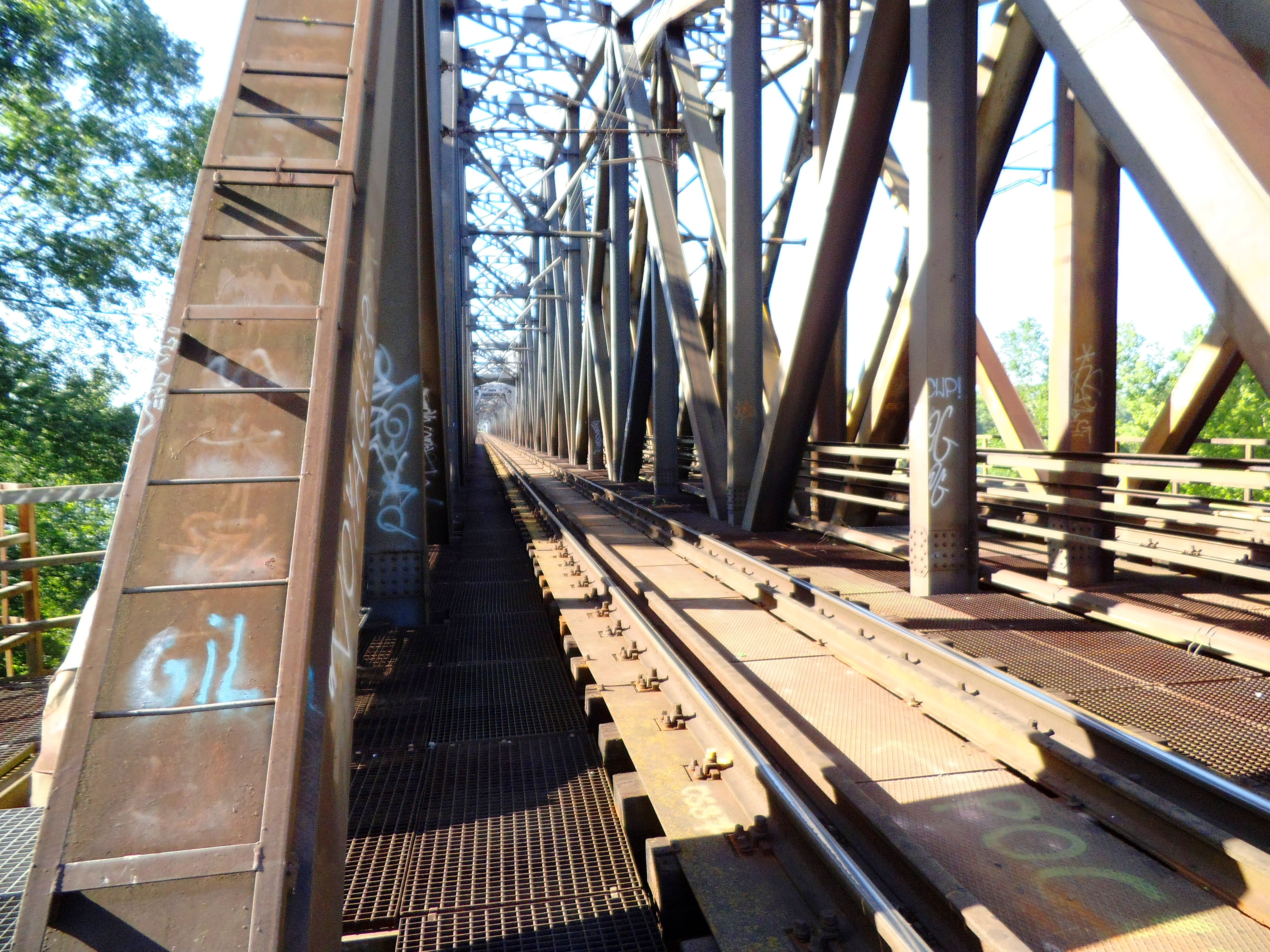 Most kolejowa Toruń